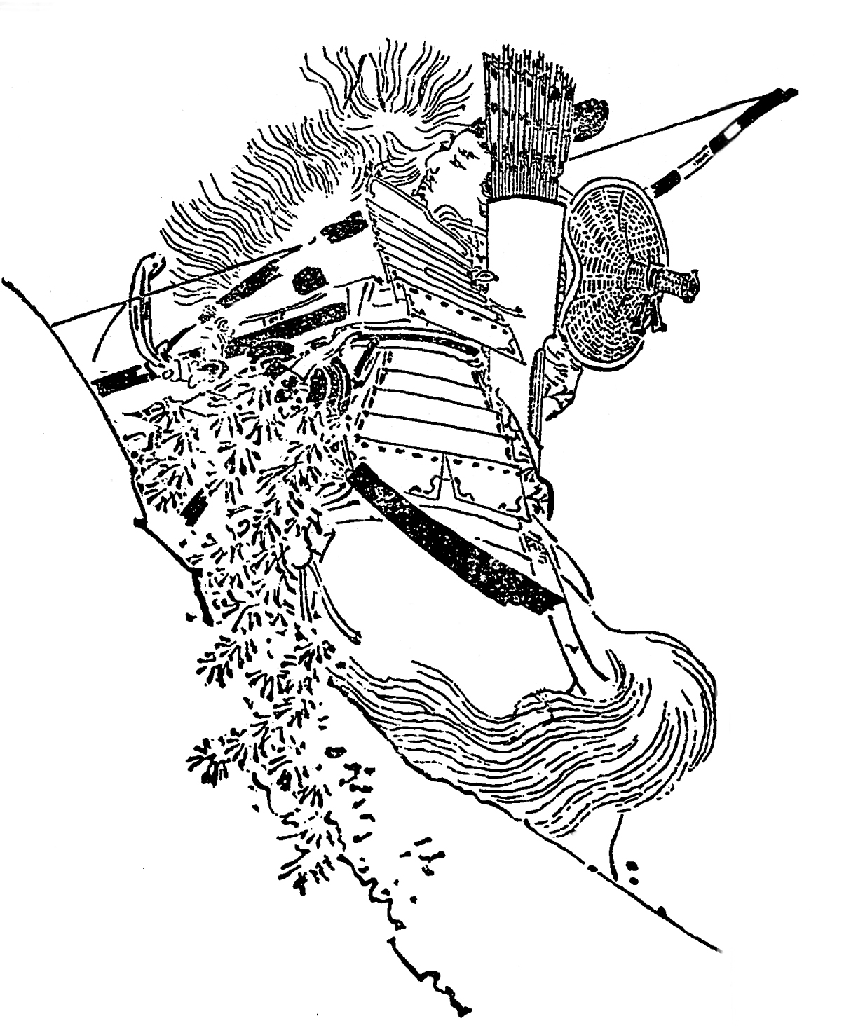 武田信義。平安時代末期 - 鎌倉時代初期の武将。／江戸時代『前賢故実』より。画：菊池容斎